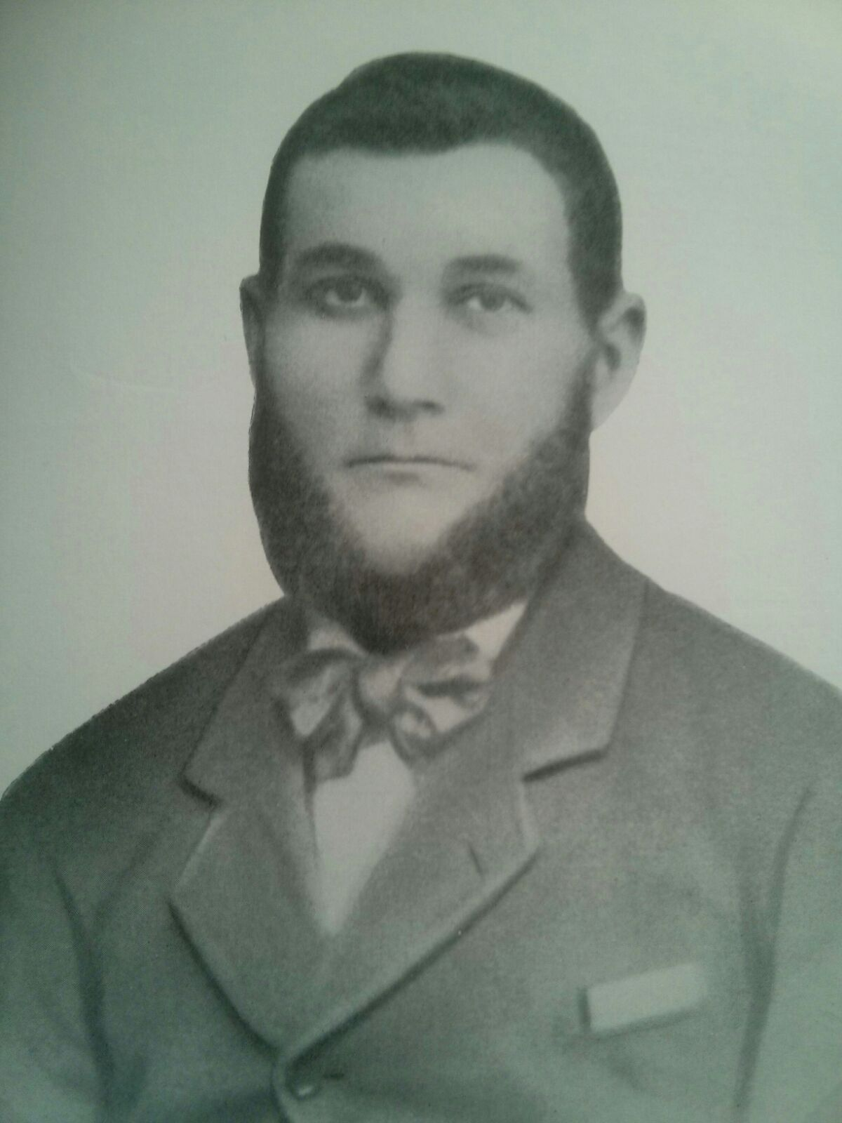 Jaume Tarragó i Plana (Tarragona, 28 d'agost de 1857 - 4 de febrer de 1908), anomenat popularment com «L'Espiridió de Tarragona» fou un casteller de la segona meitat del segle XIX conegut per la seva gran fortalesa i per haver fet història al descarregar com a segon un dels castells llegendaris del segle XIX, el 4 de 9 sense folre.